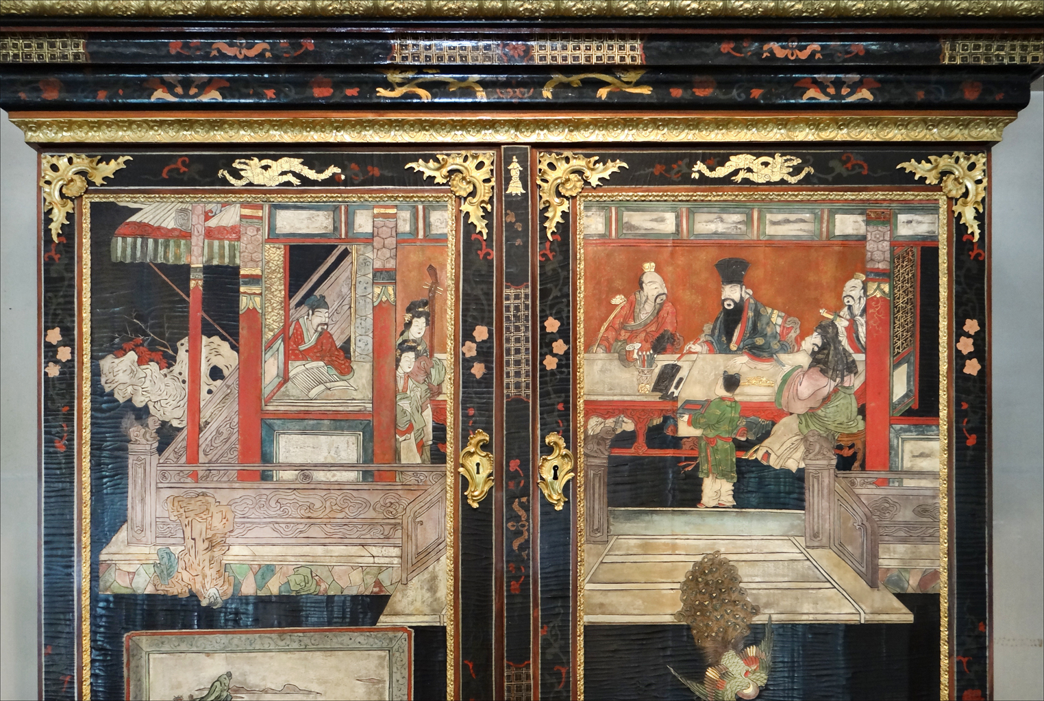 Détail d'un médailler en laque de Coromandel Paris, style Régence, vers 1730 Collection de Joseph Pellerin (1684-1782) acquis pour le Cabinet du roi en 1784 Inv.55.701 Les panneaux des portes sont découpés dans des paravents chinois dits en "laque de Coromandel", nom de la côte de l'Inde où les négociants de la Compagnie des Indes achetaient ces objets aux chinois pour les importer en France. L'ensemble est décoré de bronzes dorés. Département des Monnaies, médailles et antiques Bibliothèque nationale de France site officiel